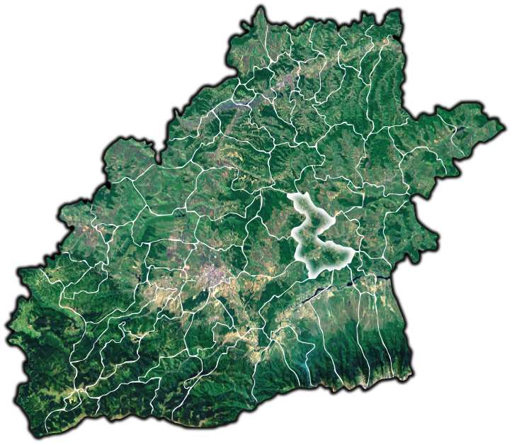 Nocrich jud Sibiu